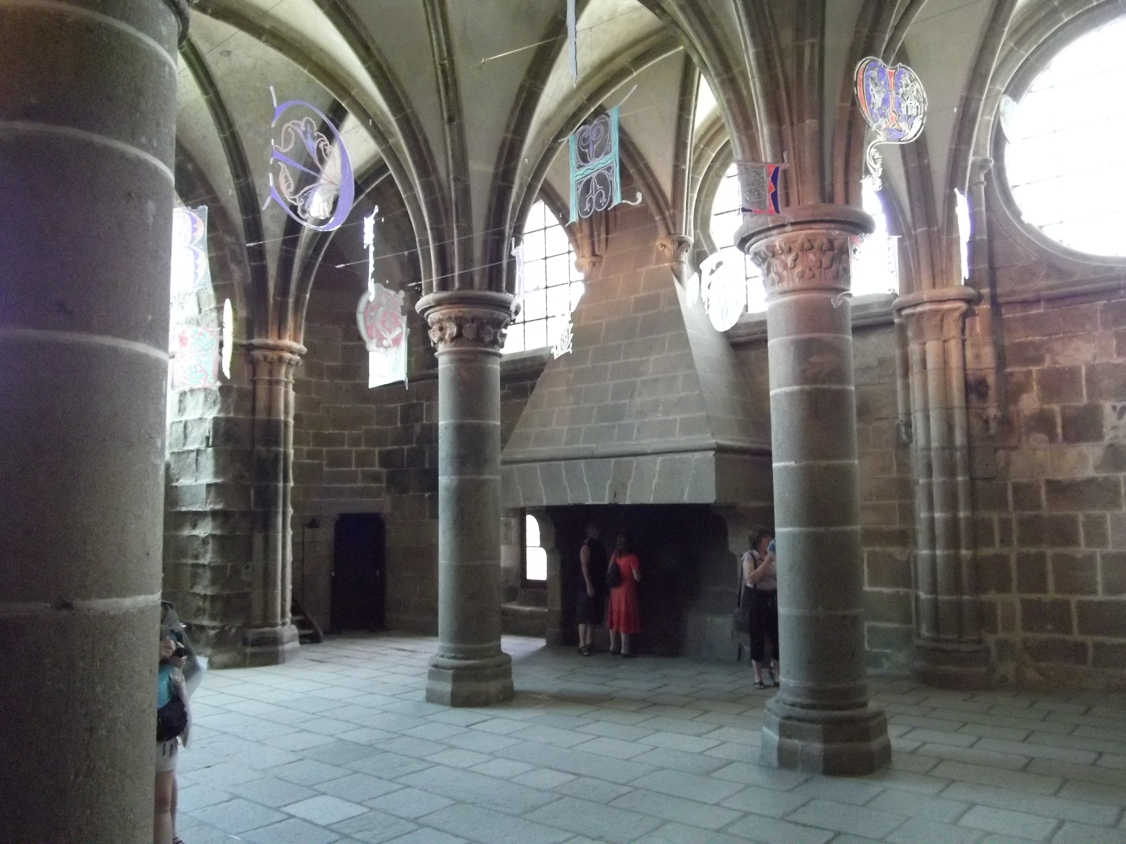 Rittersaal der Abtei Mont Saint Michel